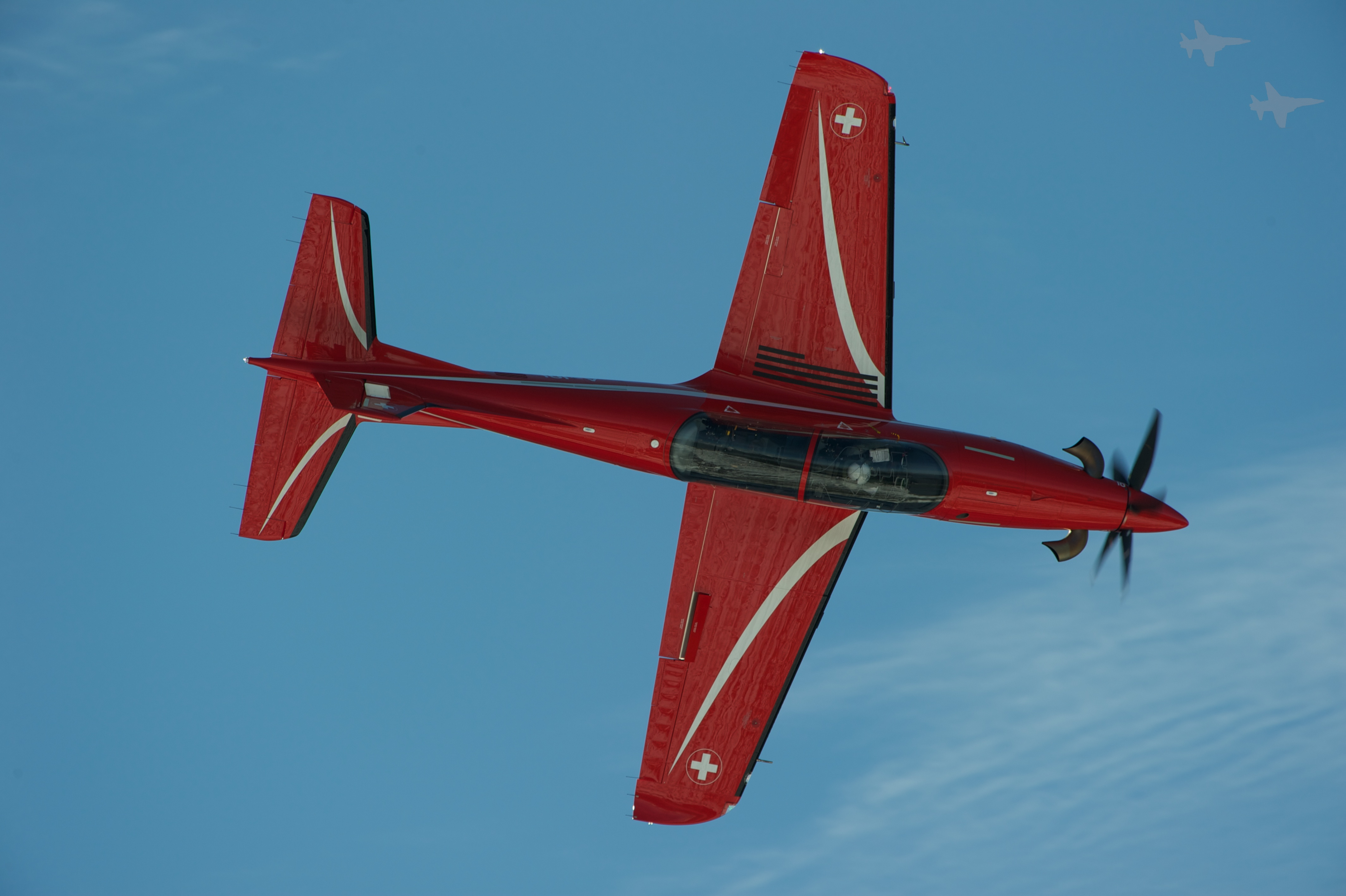 Axalp 2011